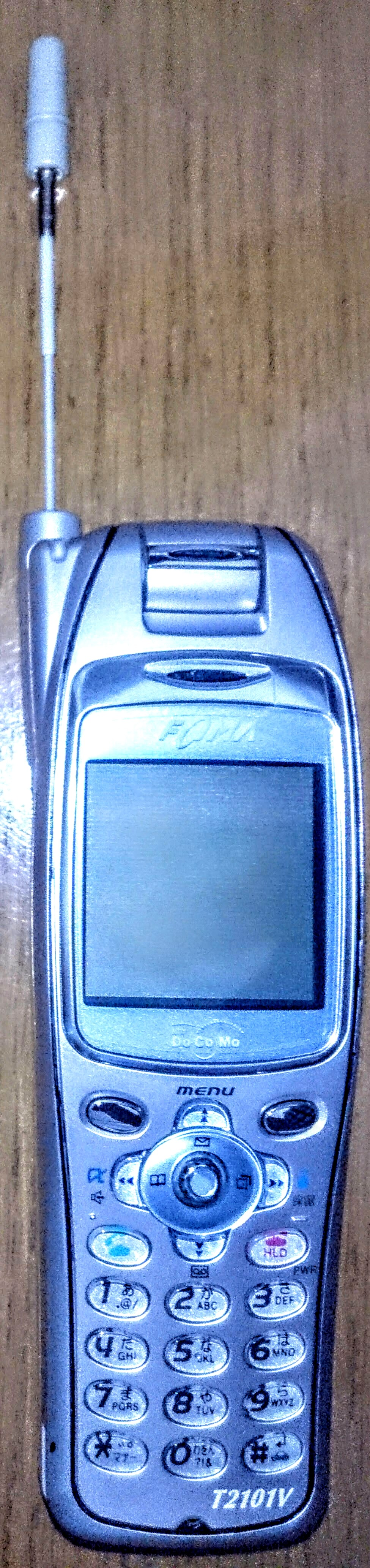 T2101V・アンテナを伸ばした様子